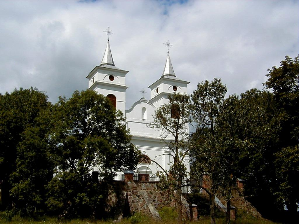 Bēržu Svētās Annas Romas katoļu baznīca 2000-07-28